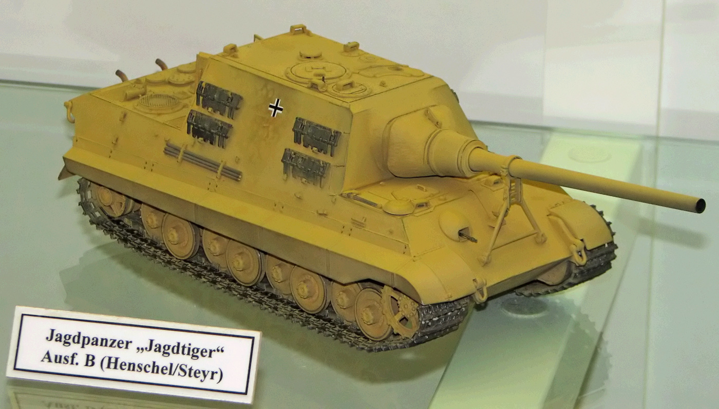 Dieses Bild zeigt ein Modell des Panzerjägers "Jagdtiger" mit Porsche-Laufwerk.